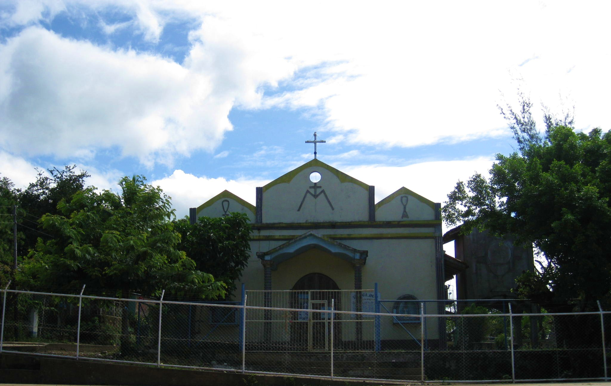 Vista desde el parque Municipal.